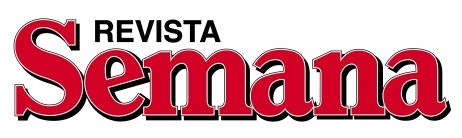 logo revista semana (letras)